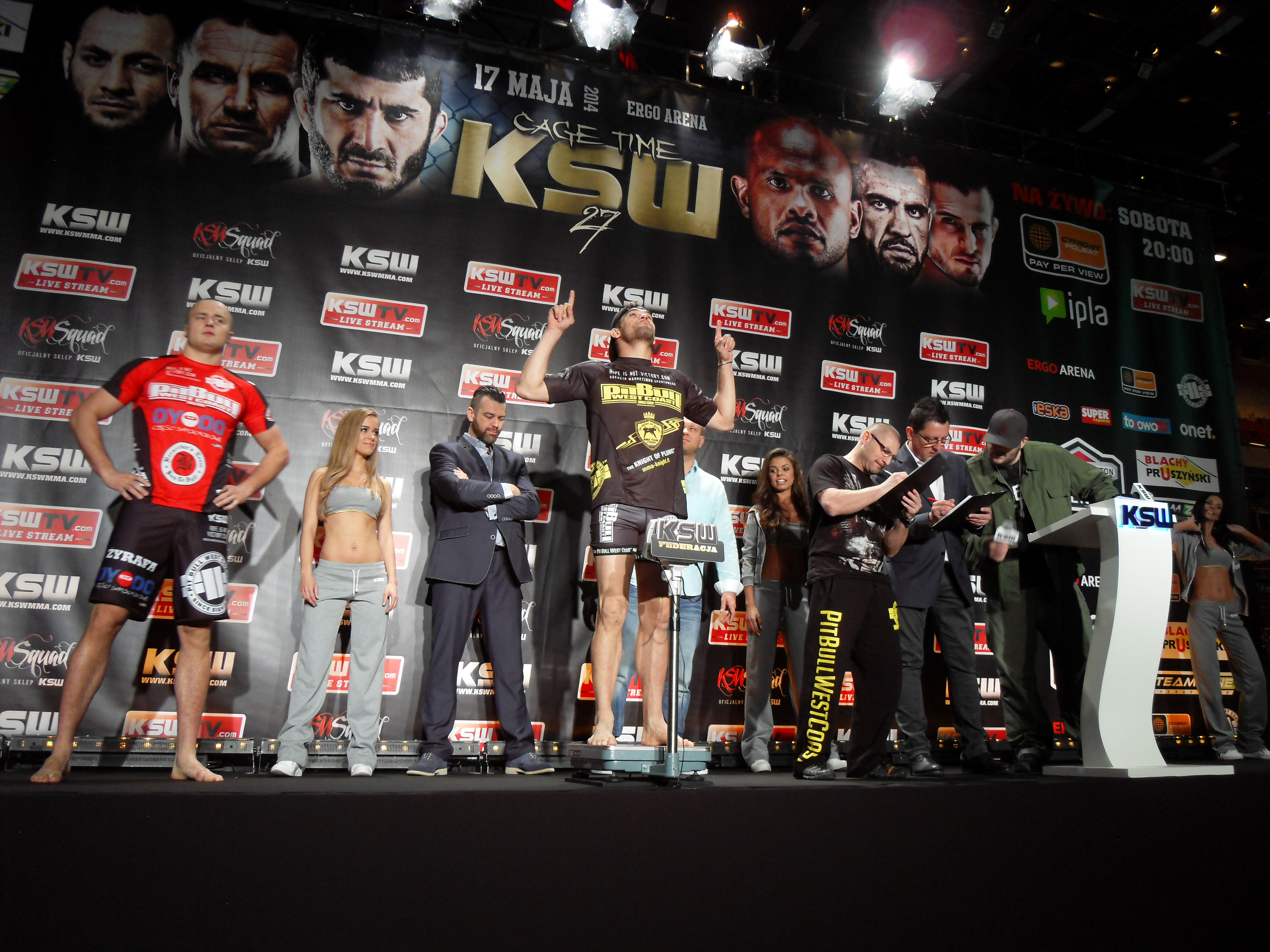 Gdańsk, ważenie w przeddzień KSW XXVII, "Ergo Arena".